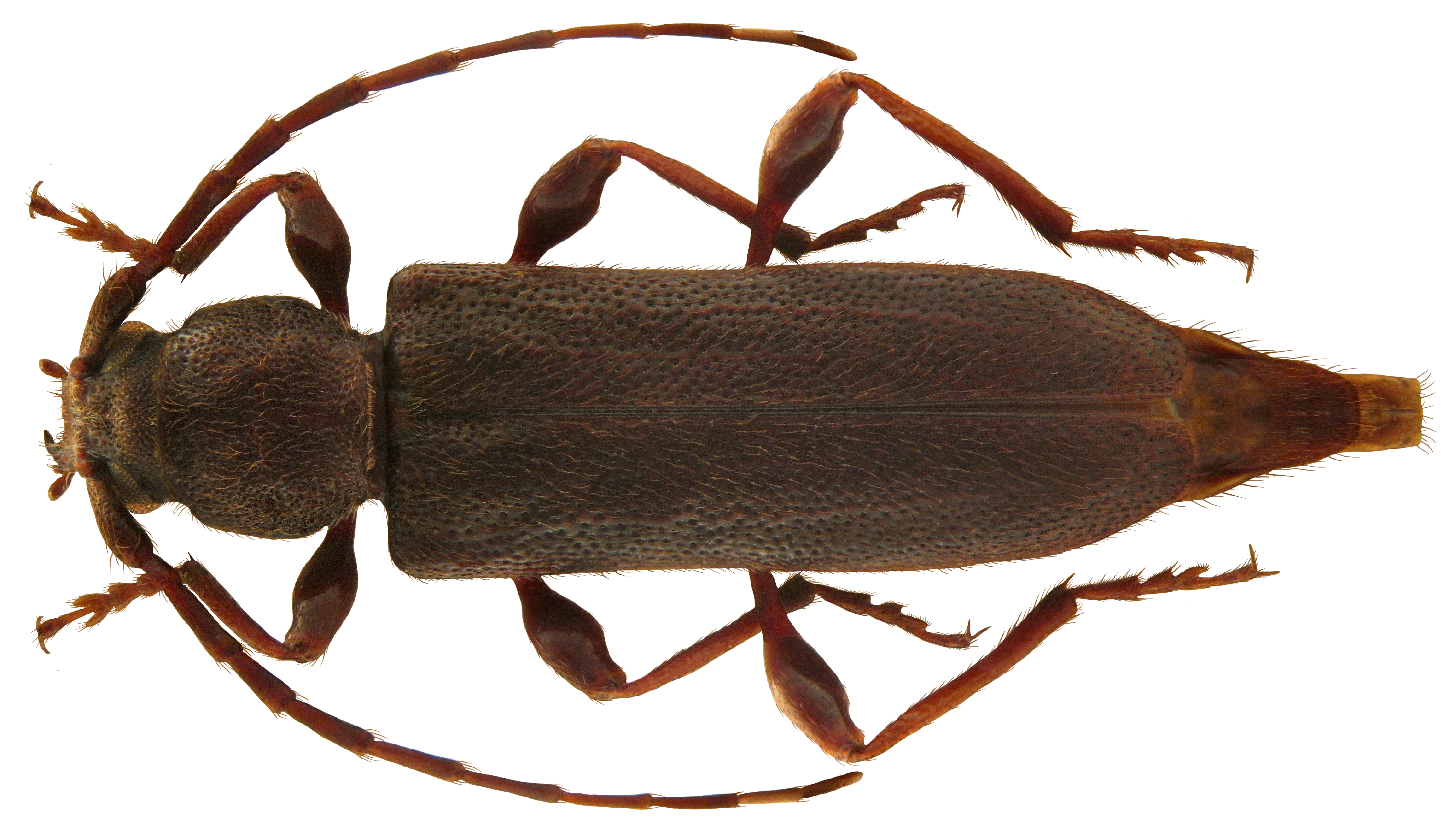 Familie: Cerambycidae Groesse: 10,5-17 mm Verbreitung: Indien, Pakistan, nach England eingeschleppt Ökologie: polyphag in Laubholz und in Nadelholz (Larix, Pinus) Fundort: Pakistan, Reshian, Daokthan, 2600 m leg. Heinz, 2001; det. A.Weigel, 2002 Photo: U.Schmidt, 2010